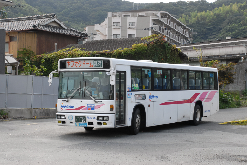 門司営業所にて、2014-9-15撮影